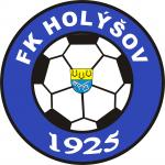 čeština